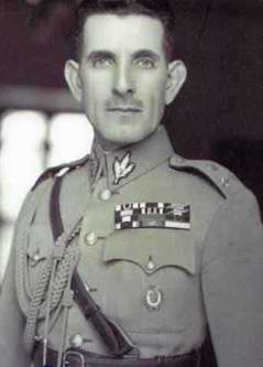 سپهدبد حاجی‌علی رزم‌آرا از نخست‌وزیران ایران